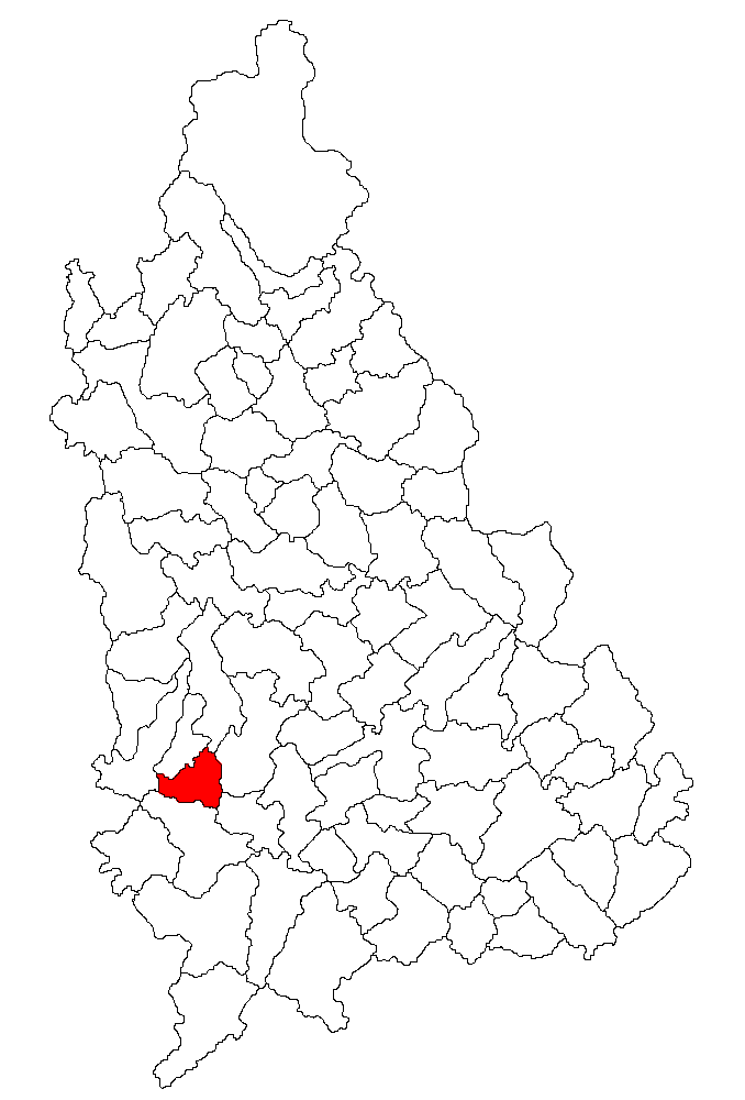 Categorie:Hărţi ale judeţului Dâmboviţa